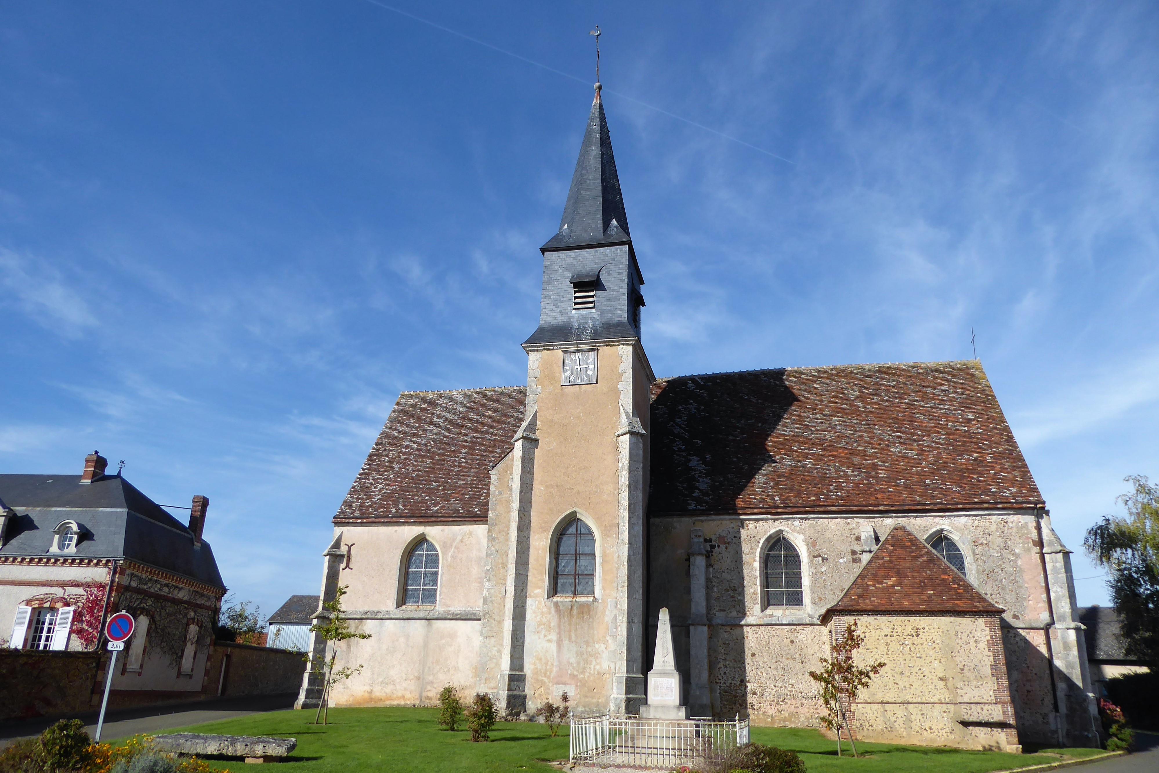 église Saint-Barthélémy, Ermenonville-la-Petite, Eure-et-Loir, France.